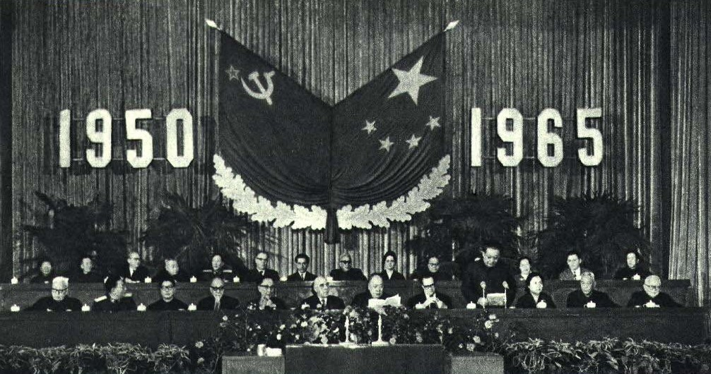 1965-4 1965年中苏友好同盟互助条约15周年庆祝